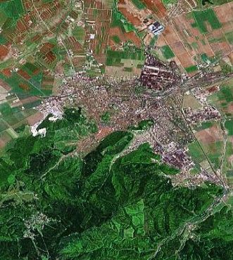 Brasovul, vazut din satelit (1999)